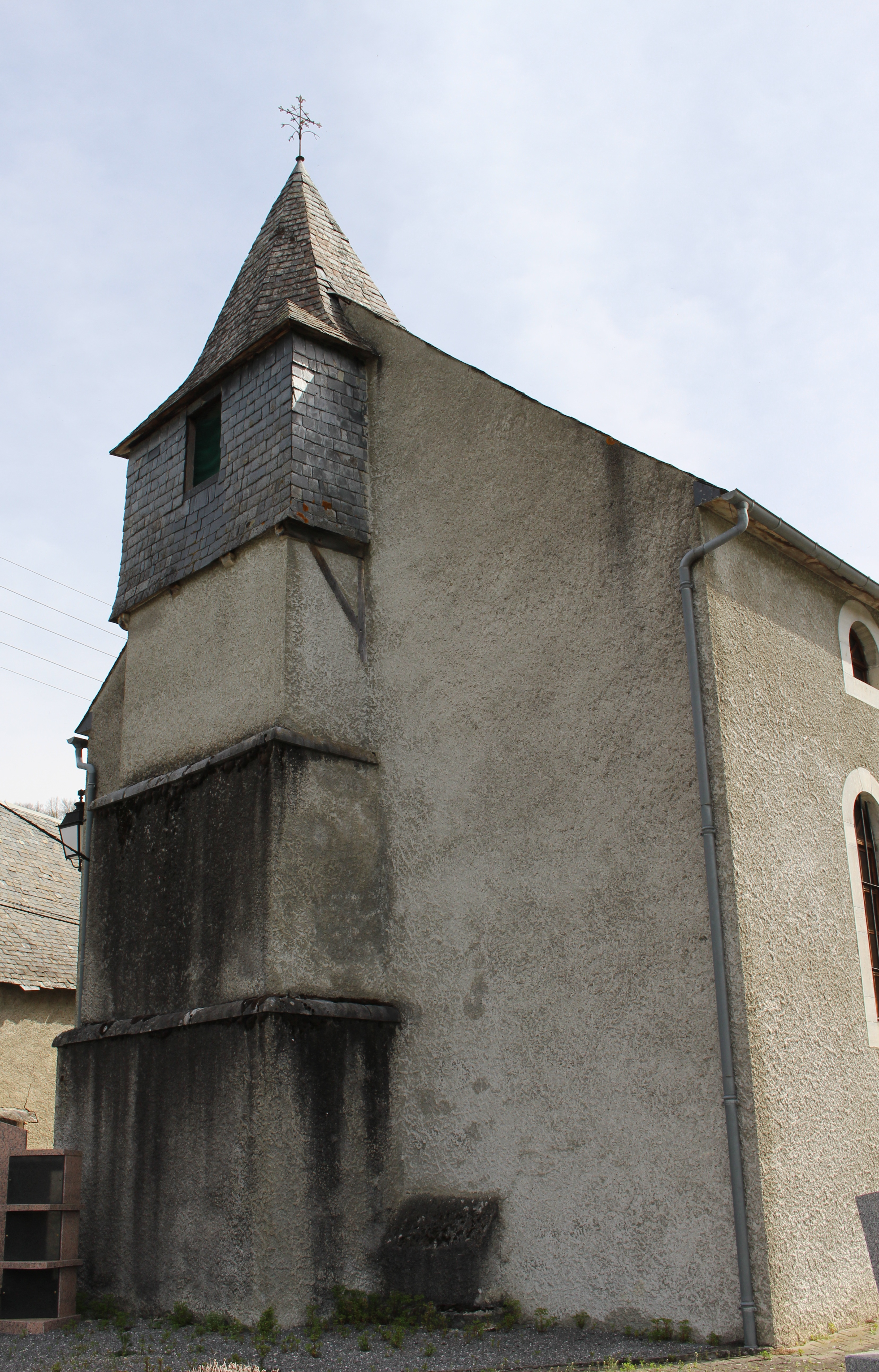 Église Saint-André d'Espèche (Hautes-Pyrénées)